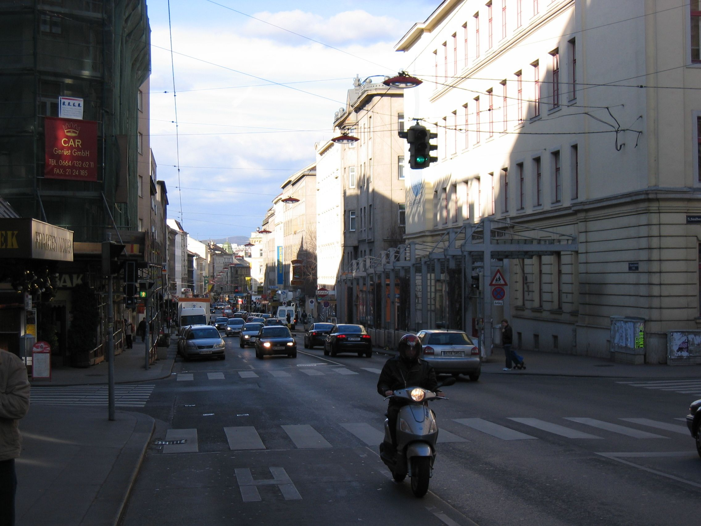 Reinprechtsdorferstraße in Richtung Norden